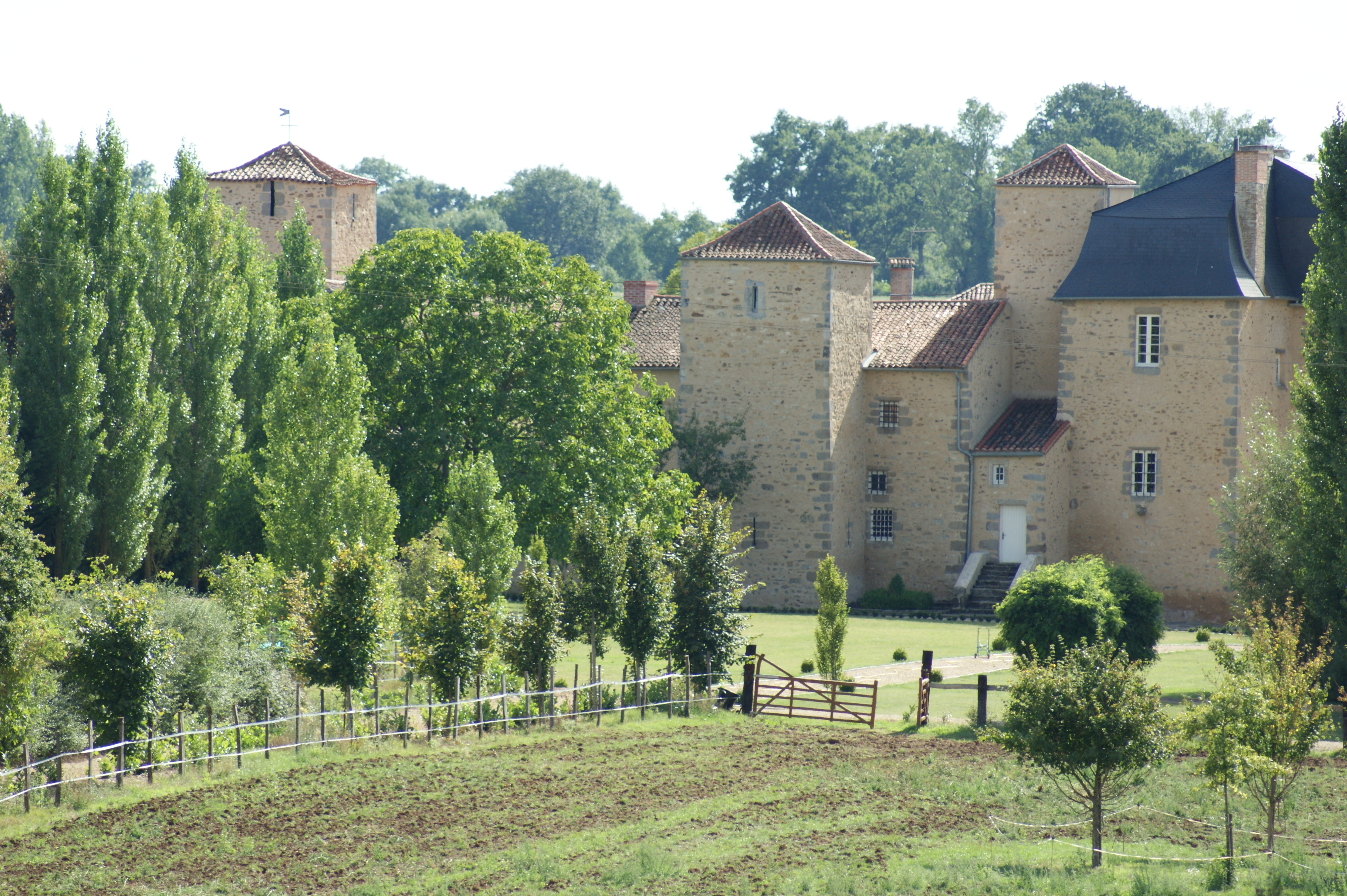 vue du château coté parc